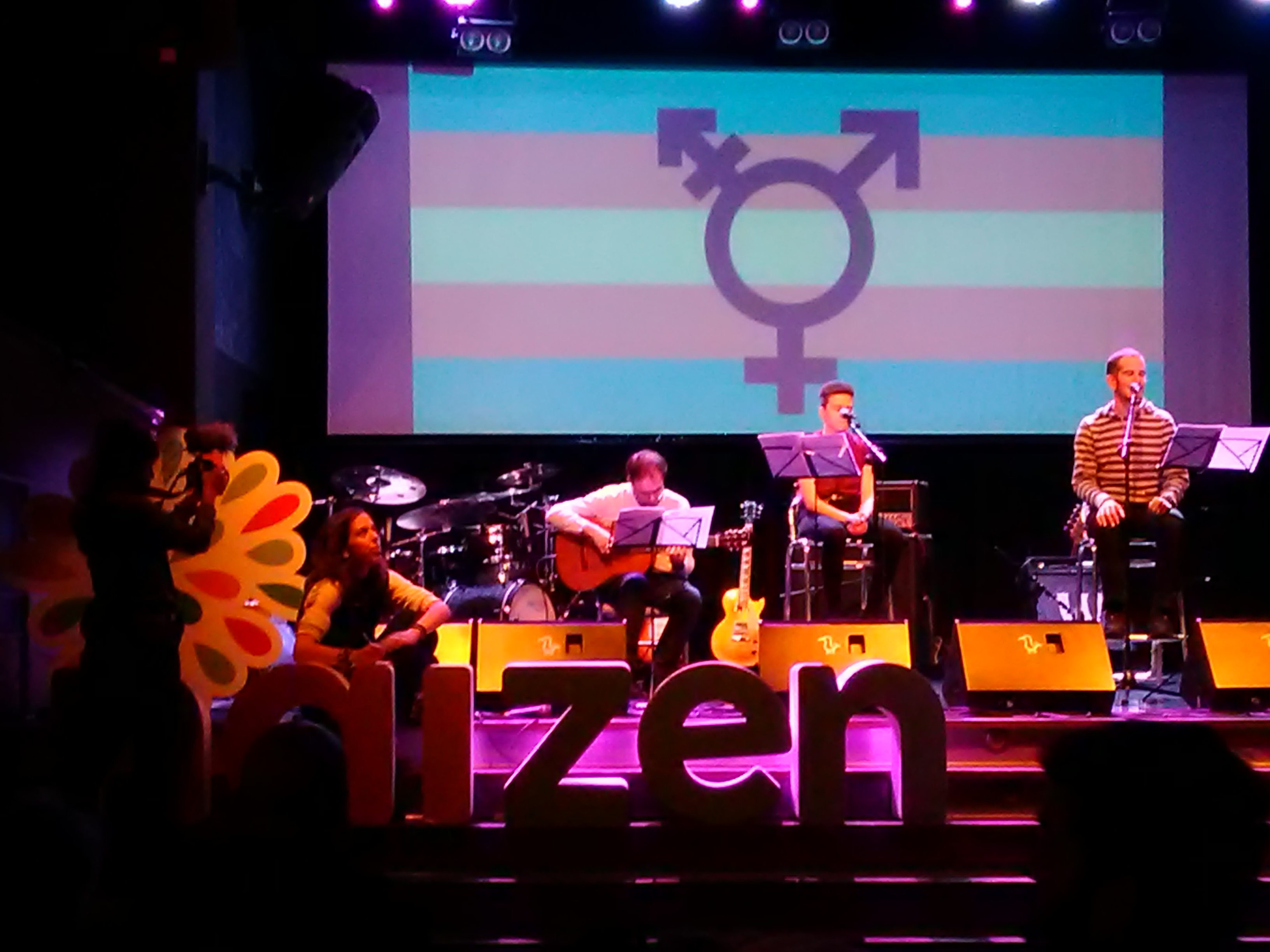 Ondarroa, 2019ko otsailaren 16a. "Naizen" elkartearen omenaldia Ekai Lersundiri, bere heriotzaren 1. urteurrenean.